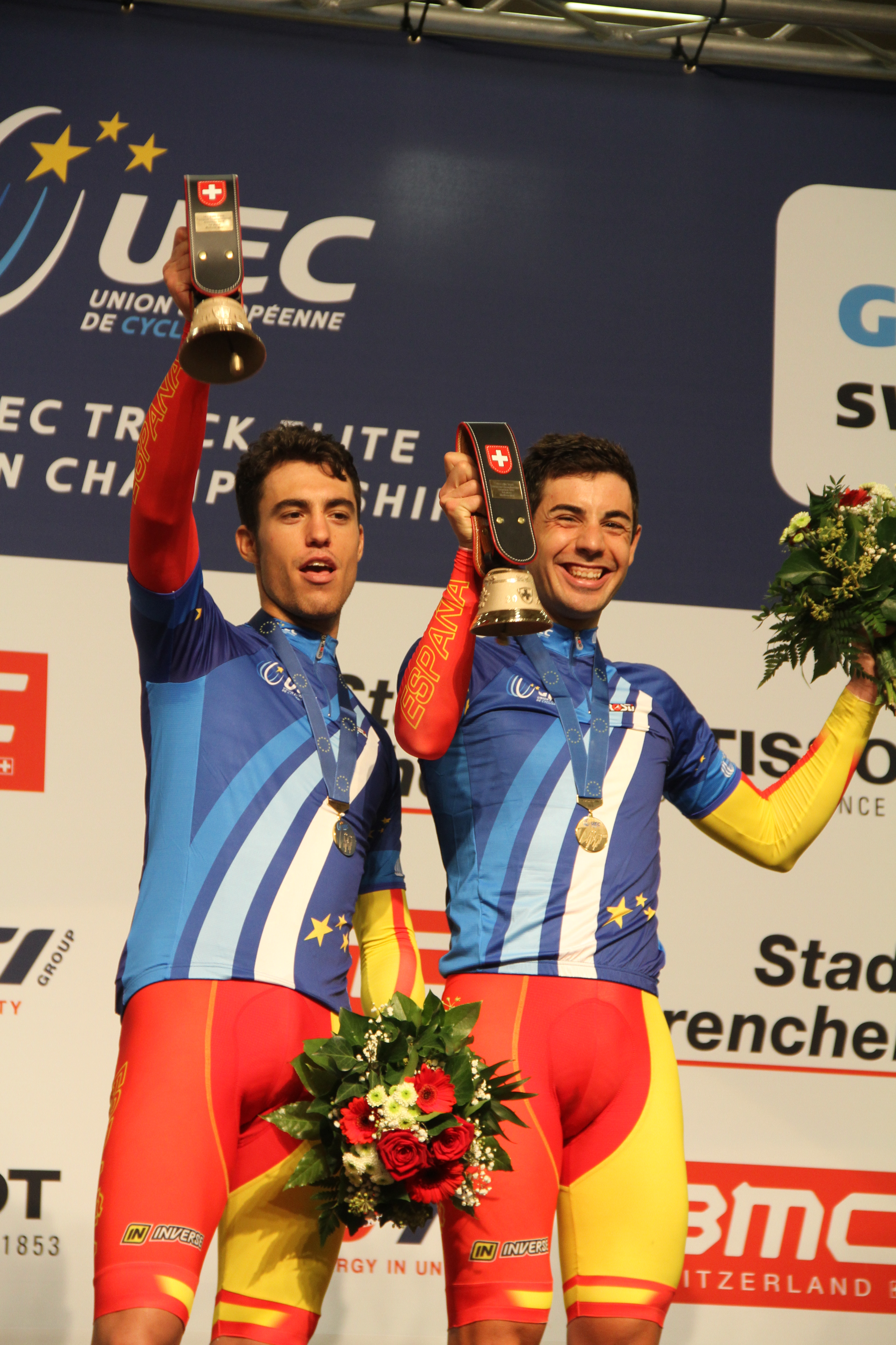 Albert Torres (l.) und Sebastían Mora, Europameister im Zweier-Mannschaftsfahren The making of this document was supported by the Community-Budget of Wikimedia Germany.